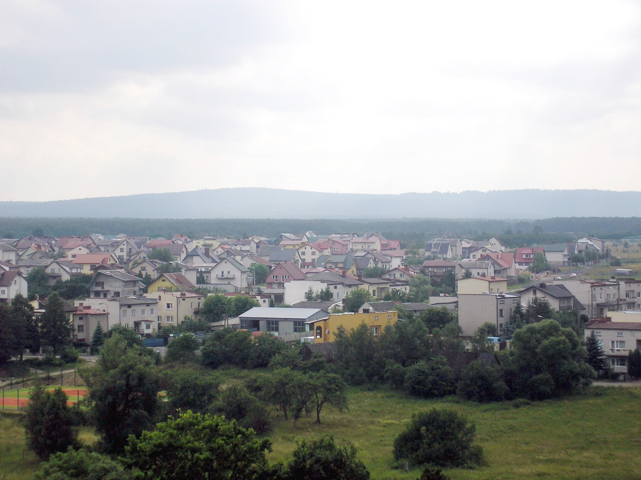 Szydłowiec: Góra Altana oraz os. Nad Zalewem